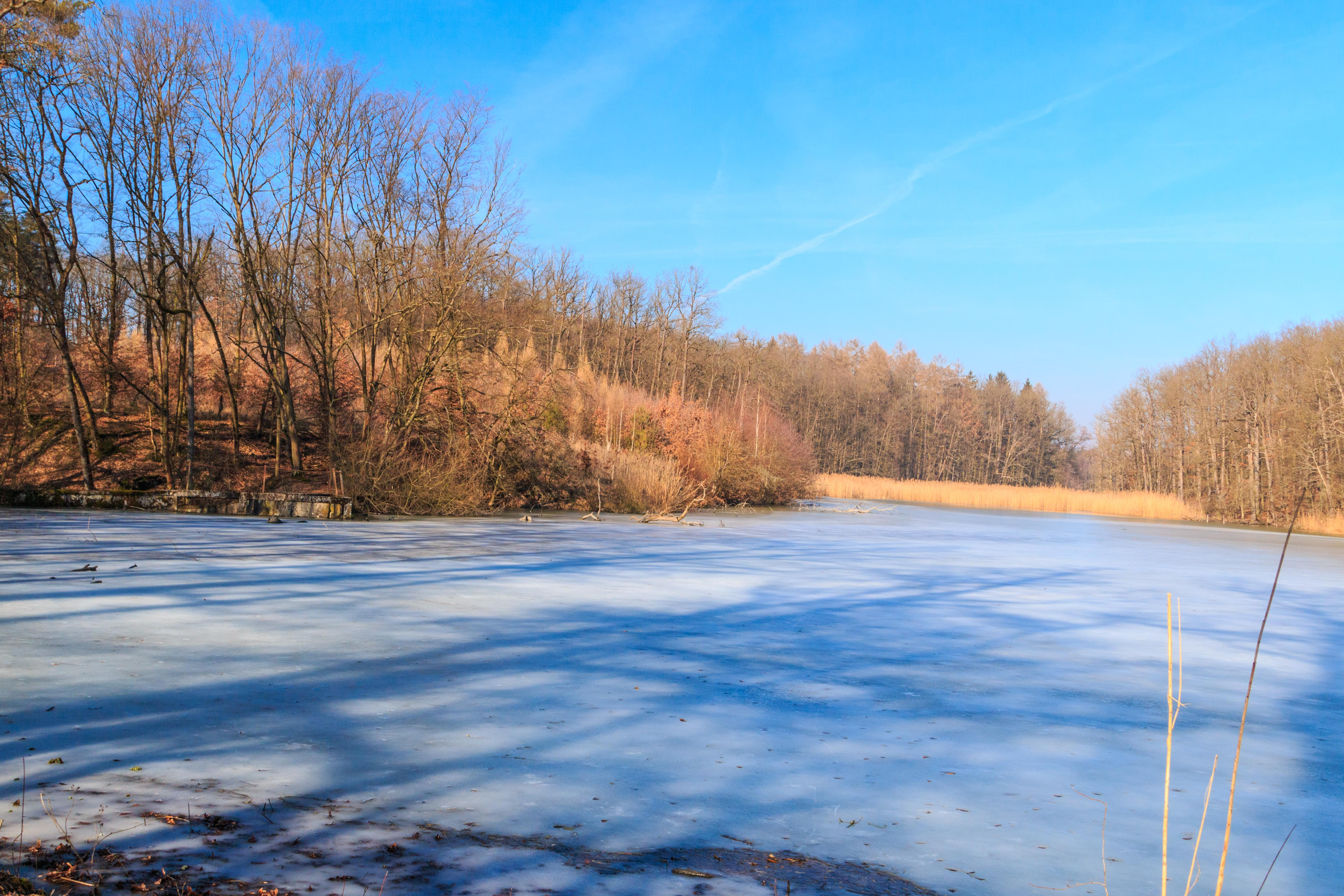 pohled na rybník Hanušov Project: Vodstvo Ticket: 1711.